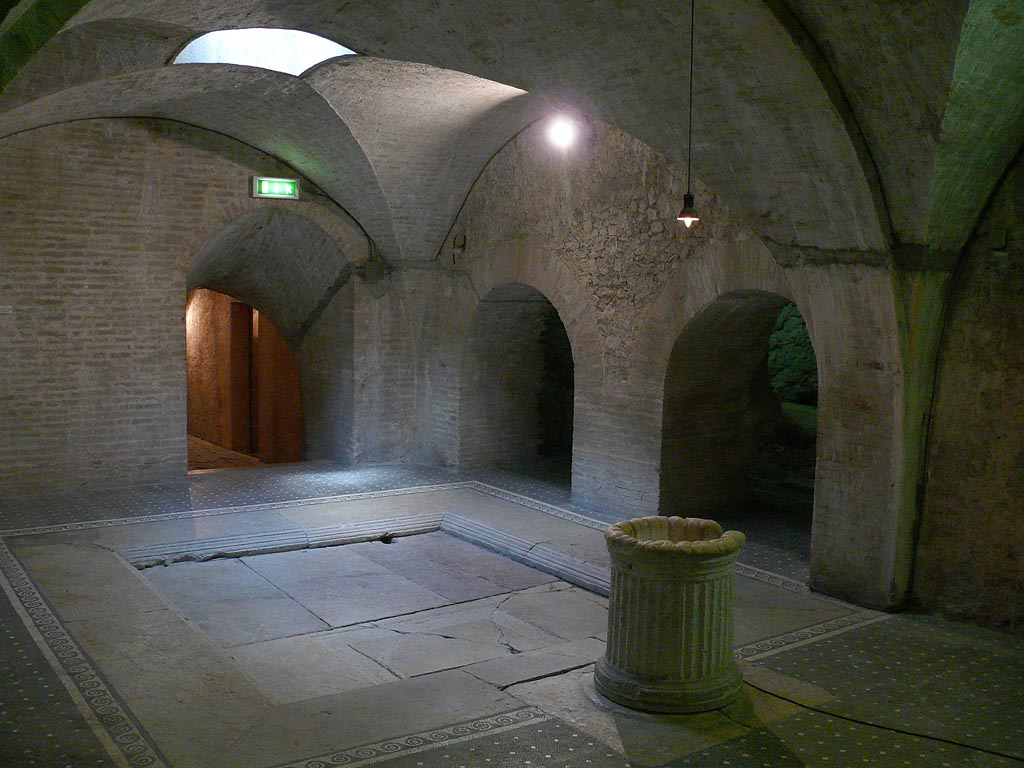 Spoleto: Casa romana, Atrium